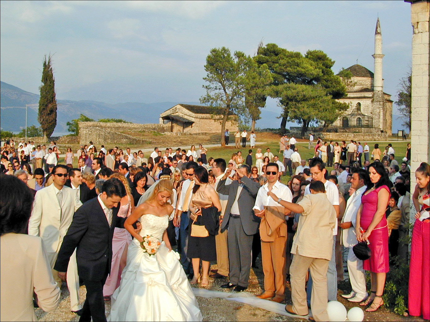 Un mariage se rendant à la chapelle byzantine. Au fond, la mosquée d'Ali Pacha __________________ Ioannina est la capitale de l'Epire, elle est construite au bord d'un lac. Elle a été turque jusqu'en 1913 et possède encore deux mosquées situées dans l'enceinte de la citadelle. La mosquée Aslan Pacha qui est devenue un musée et la mosquée Ali Pacha. Ali Pacha (1744-1822) a gouverné la région pendant près de 30 ans. Site de l'auteur sur la Grèce (2003)